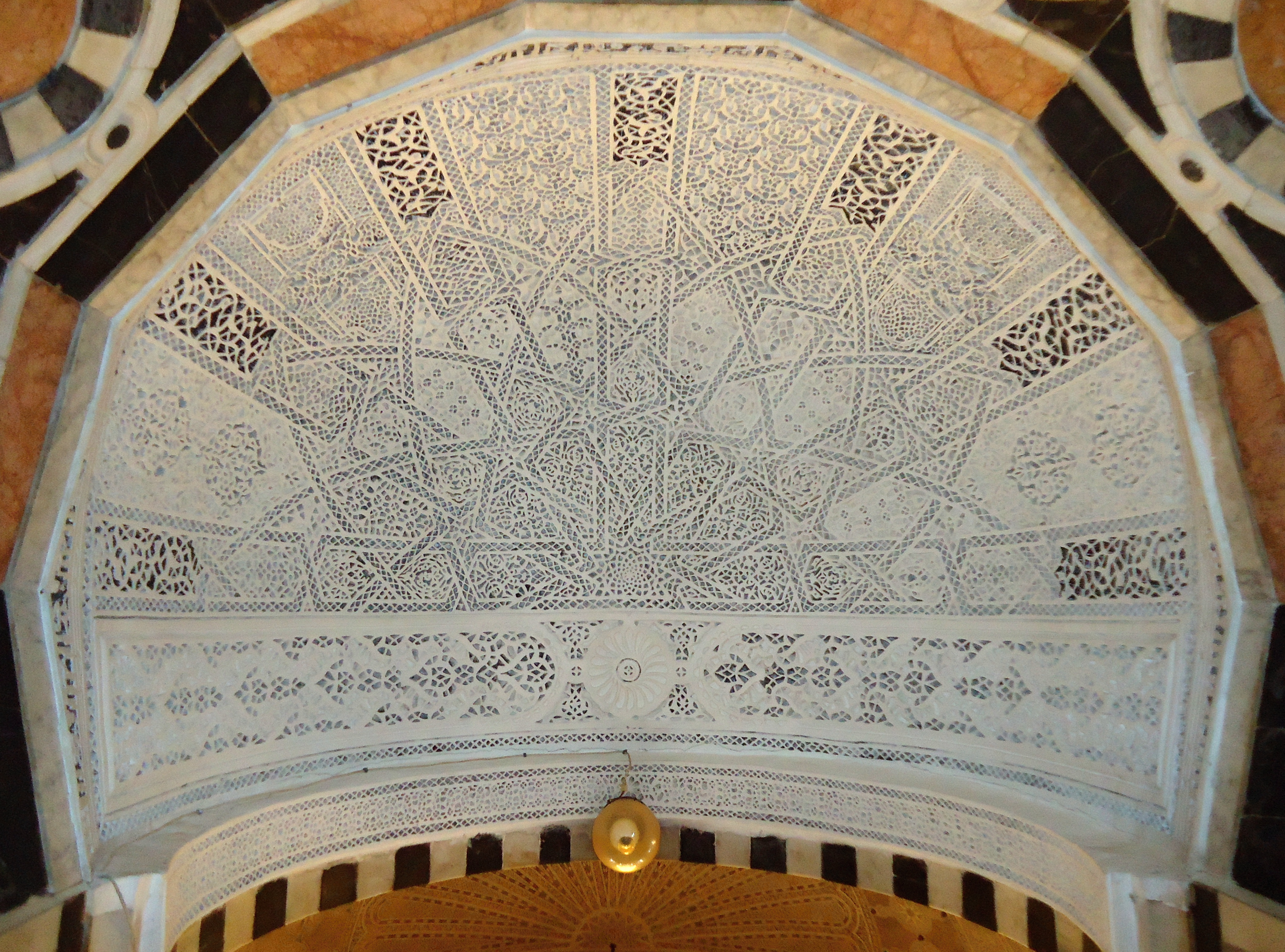 Intrados de la niche hémisphérique du mihrâb, Mosquée de Mohammed Bey, Tunis